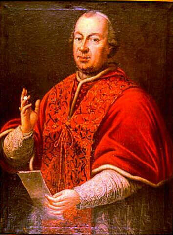 Portrait du pape Pie VI